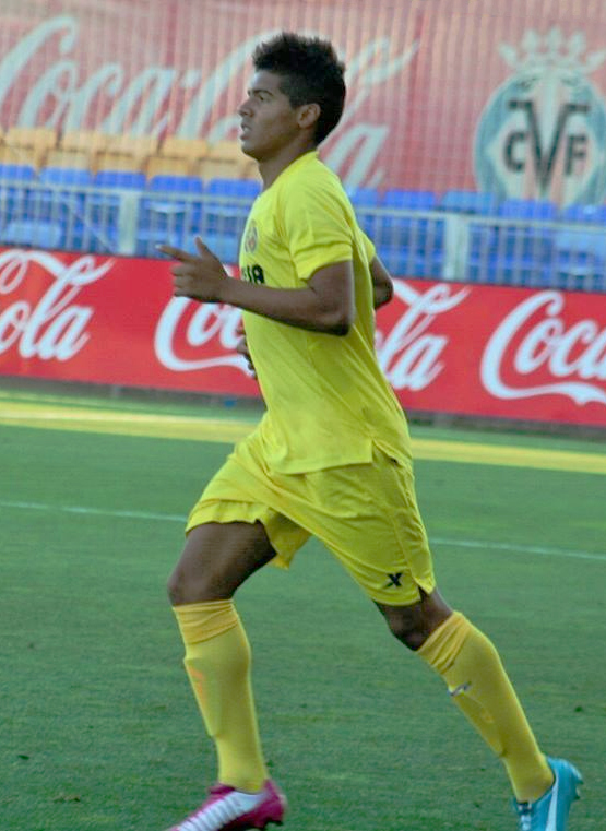 Carlos Julio Martines jugando con el Villareal